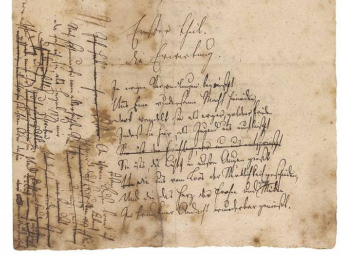 Für das Frankfurter Goethehaus erworbenes Novalis-Manuscript, Entwurf zum Romanfragment „Heinrich von Ofterdingen“ Literatur: Goethe-Haus sichert sich Novalis-Handschrift - weiter lesen auf FOCUS Online